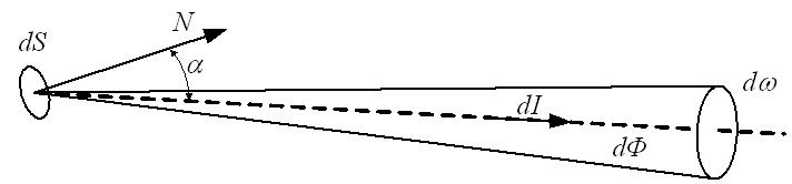 Яркость